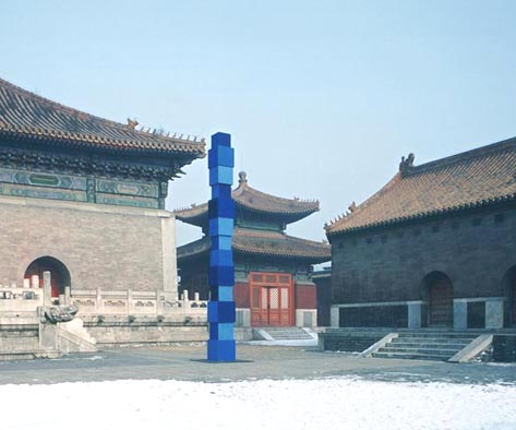 Jürgen Partenheimer, Nationalmuseum Peking, "Weltachse", Kaiserliches Staatsarchiv, 2000